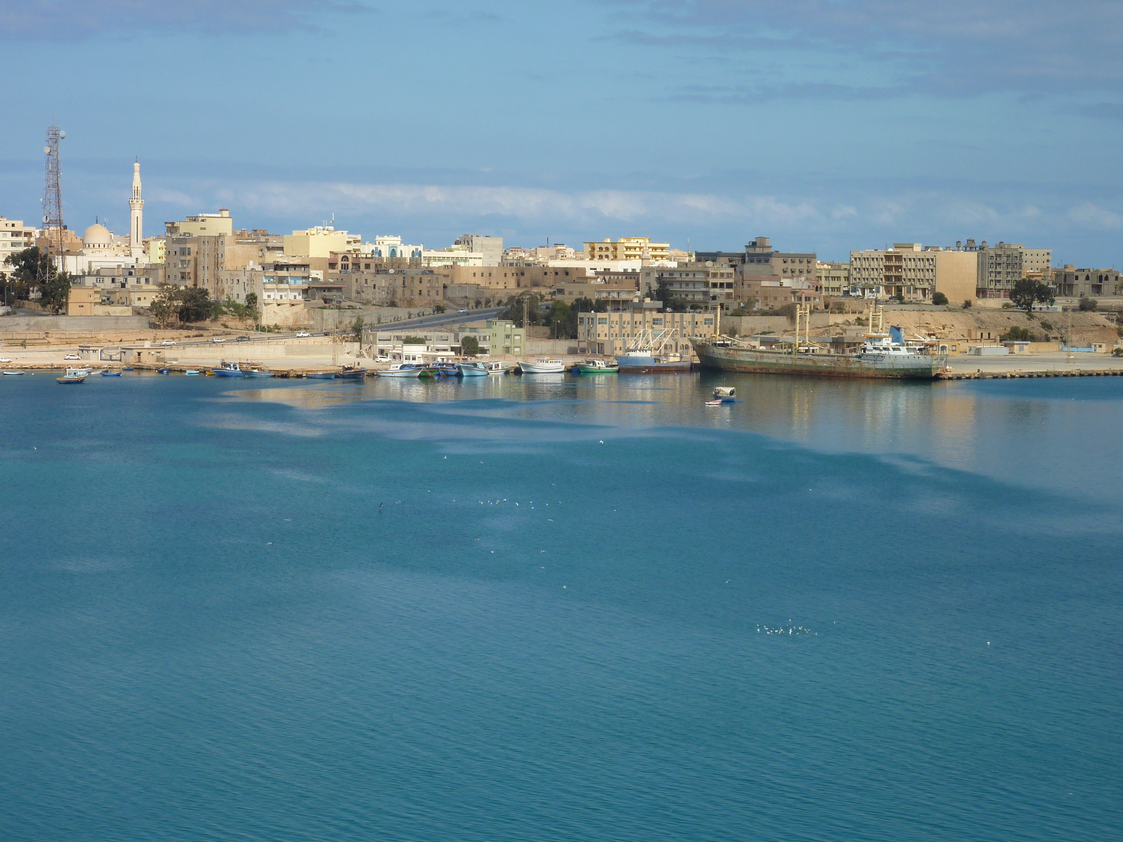 Tubruk port